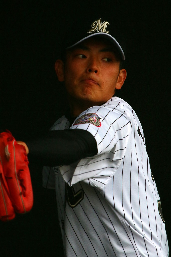 日本プロ野球 千葉ロッテマリーンズ 田中英祐投手 背番号31